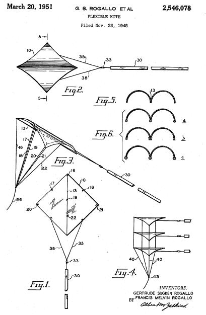 Patentskizzen des "Flexible Kite" von Rogallo 23.11.1948 (US-Patent 20.03.1951) Die skizzierten flexiblen Tragflächen bestehen nur aus Stoff und Schnüren ohne zusätzliche feste Aussteifungen.